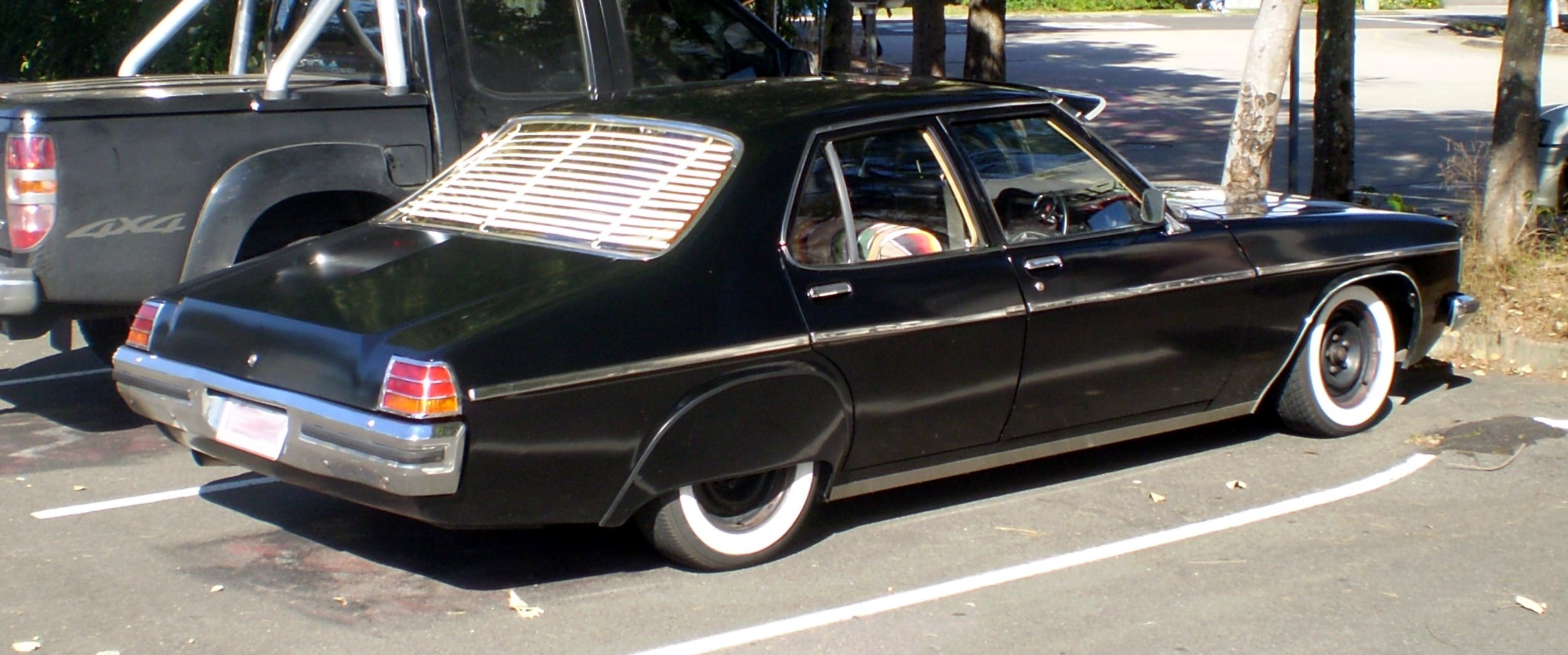 Holden sedan with spats or fender skirts